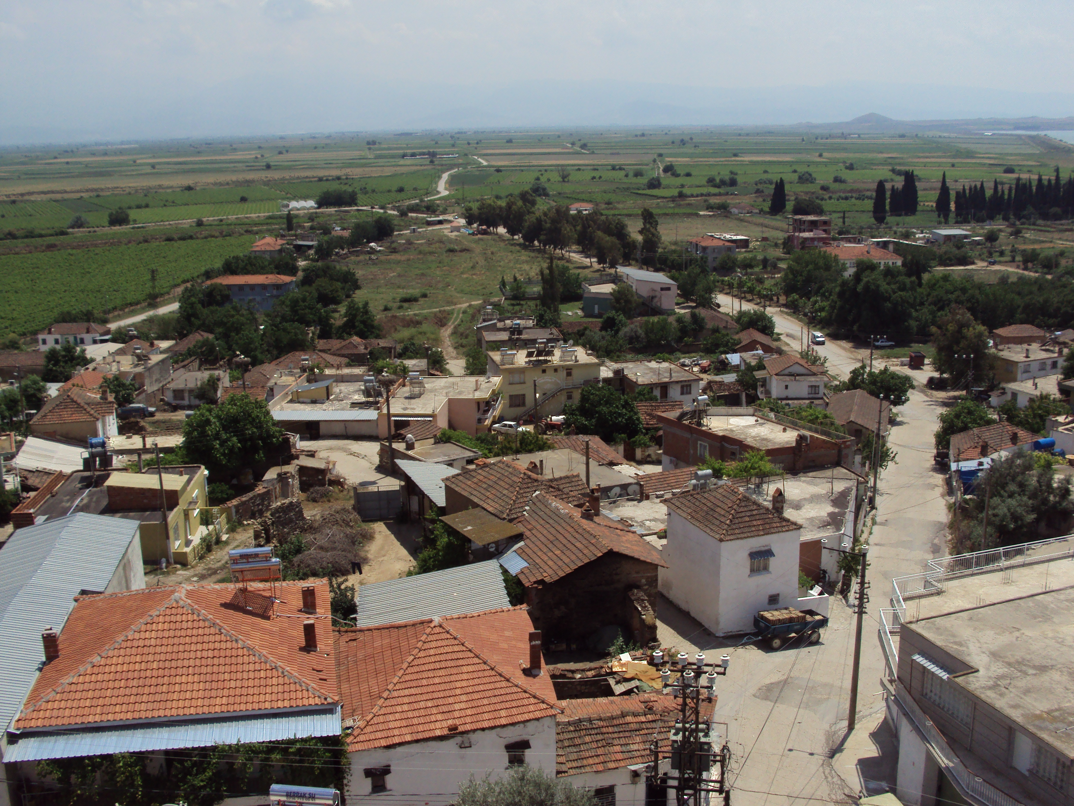 KÖY GÖRÜNTÜLERİ